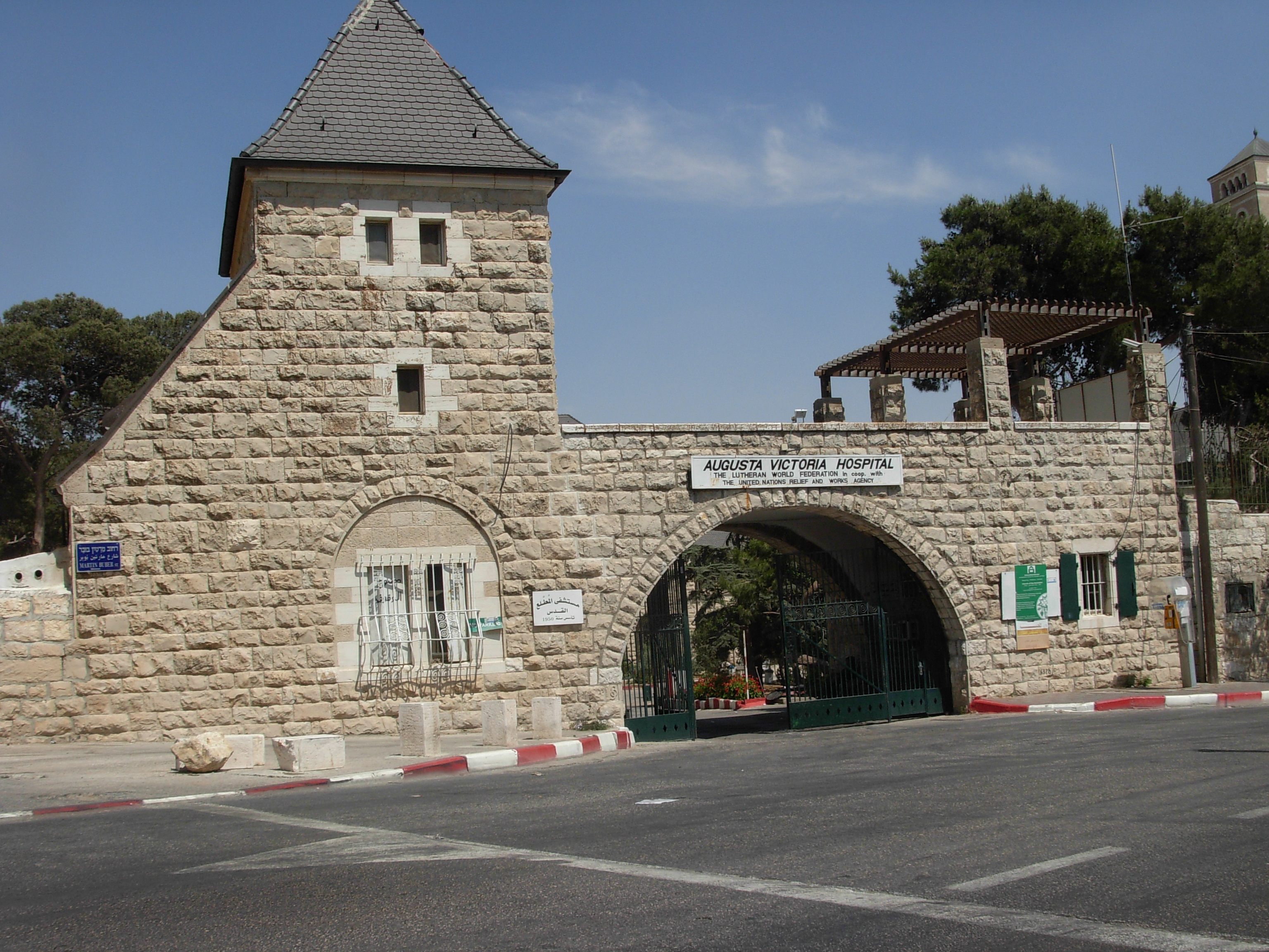 מתחם אַוּגוּסְטֶה ויקטוֹריה משתרע על שטח של כ-80 דונם בפסגת הר הזיתים בירושלים. נקרא על שם אוגוסטה ויקטוריה משלזוויג הולשטיין, אשתו של מקים המתחם, וילהלם השני, קיסר גרמניה. במתחם כנסייה עם מגדל פעמונים, וכן אכסניית צליינים. כיום משמש כבית חולים, ובמזרחו ממוקם "המכון הגרמני הפרוטסטנטי לארכאולוגיה בארץ הקודש".